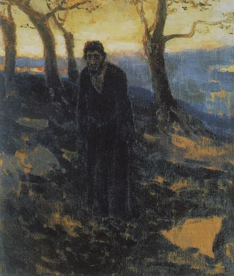 Иуда